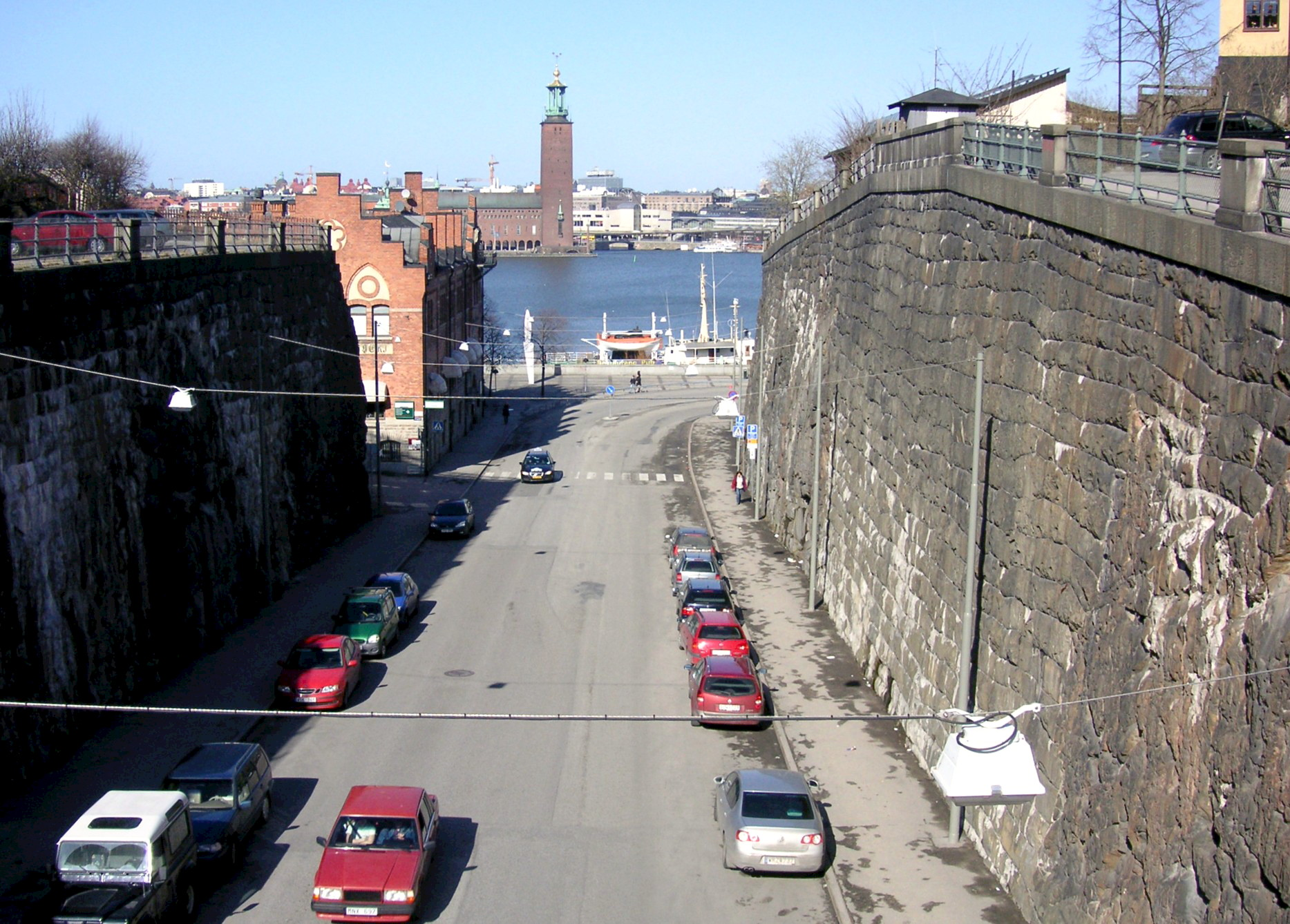 Torkel Knutssonsgatan mot Riddarfjärden i Stockholm